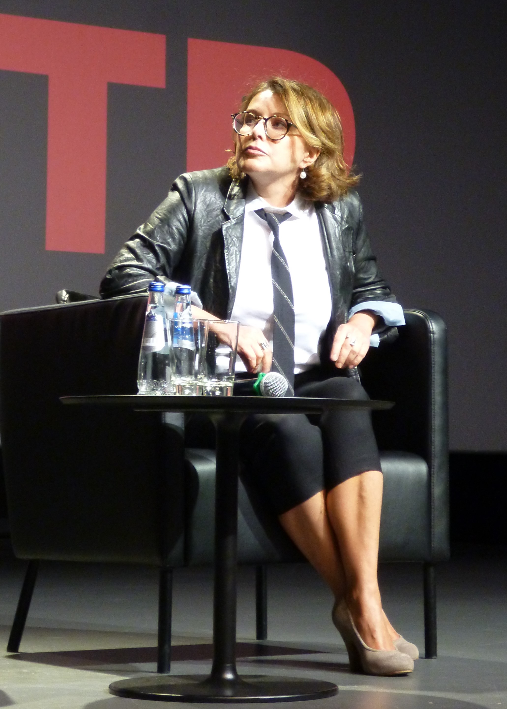 Наталья Негода в Ельцин-центре на показе Маленькой Веры 7 марта 2020 года